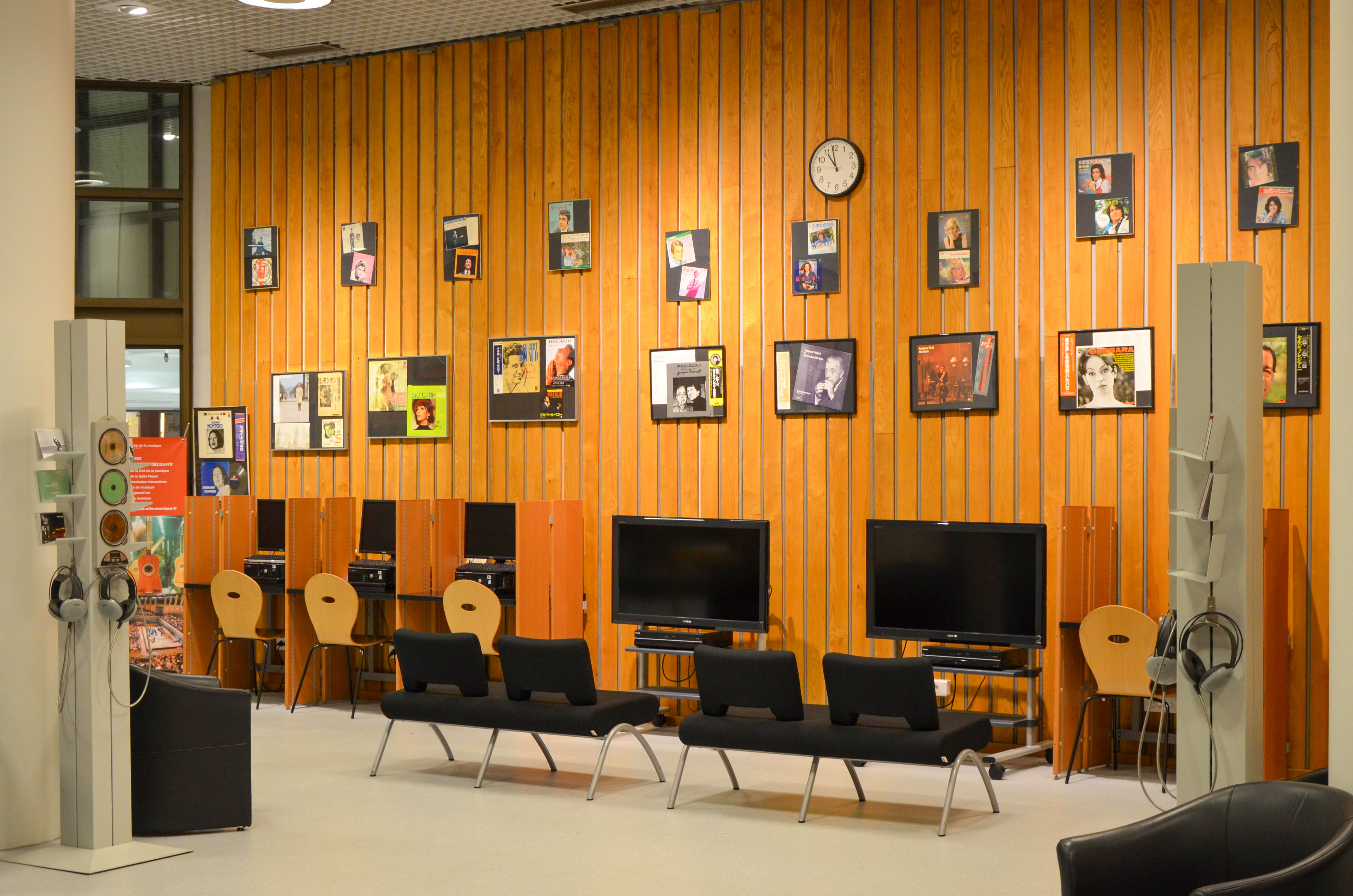 Salle Ecoute et Découverte du service des Archives Sonores de la MMP (travaux en 2009-2010)